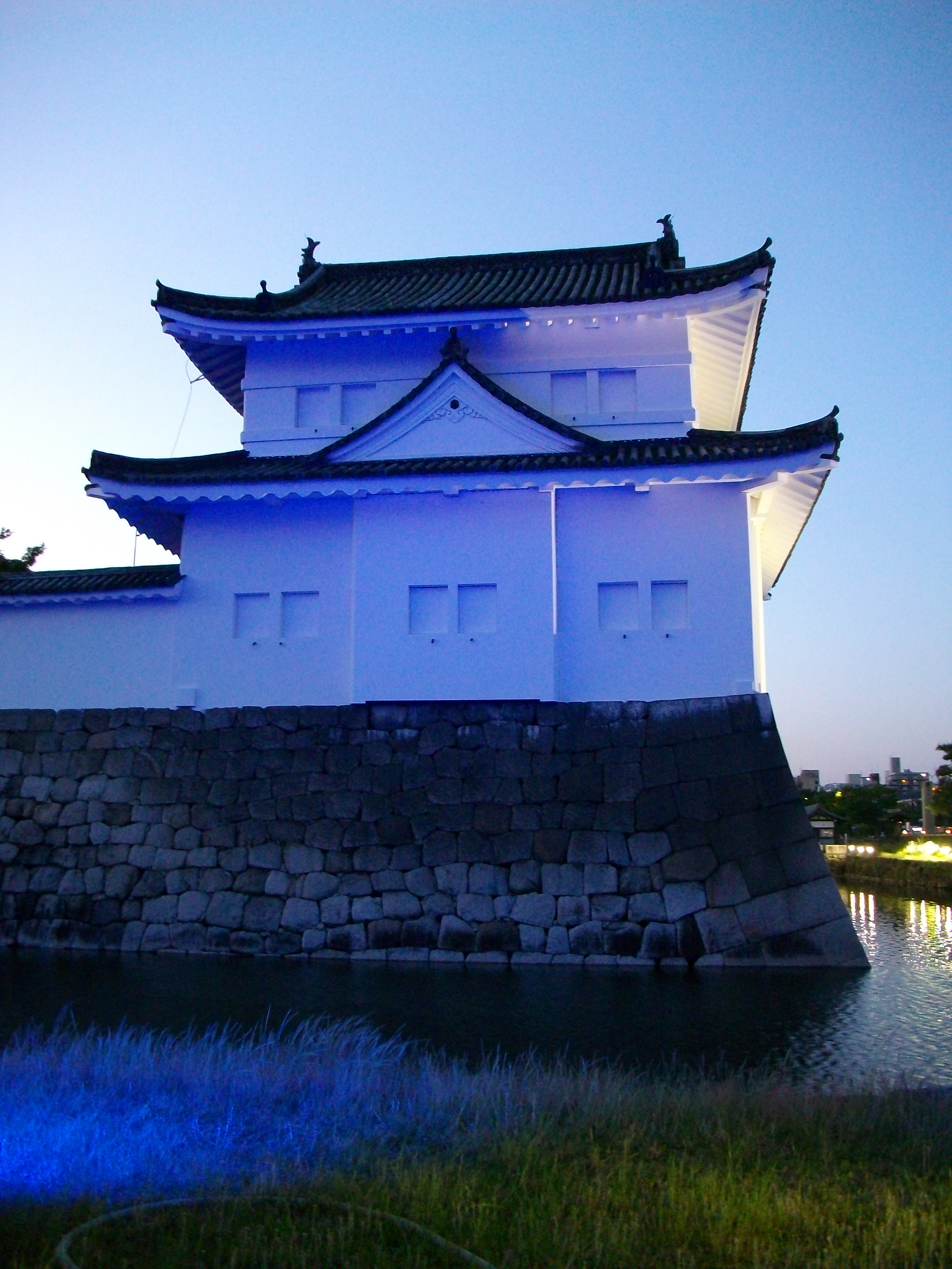 新型コロナウイルス治療の最前線で命懸けで向き合う医療関係者への感謝と応援の気持ちを表現する世界的なブルーライトアップ運動に参加した世界遺産「古都京都の文化財」の二条城隅櫓。